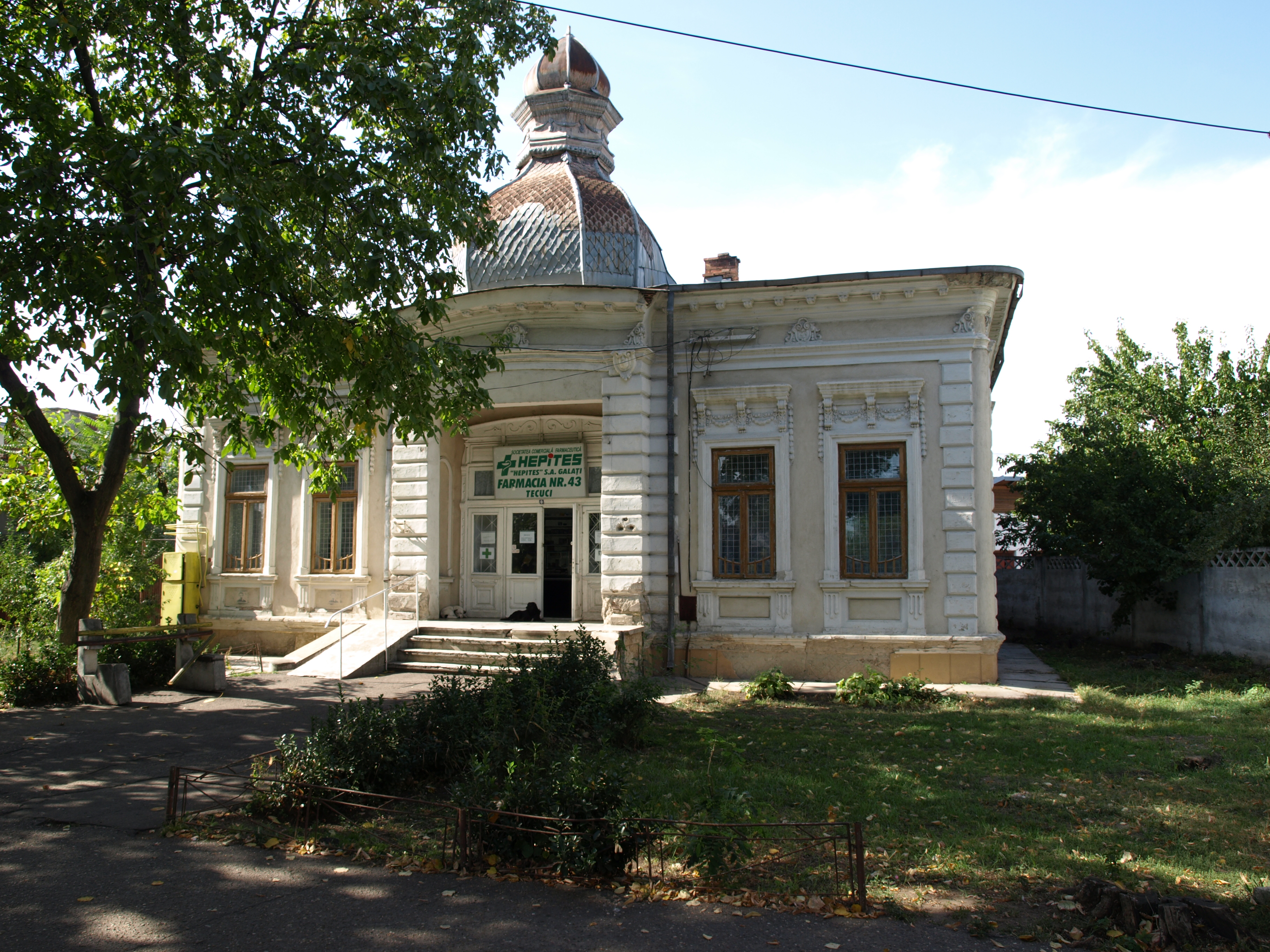 Casă - acum Farmacie